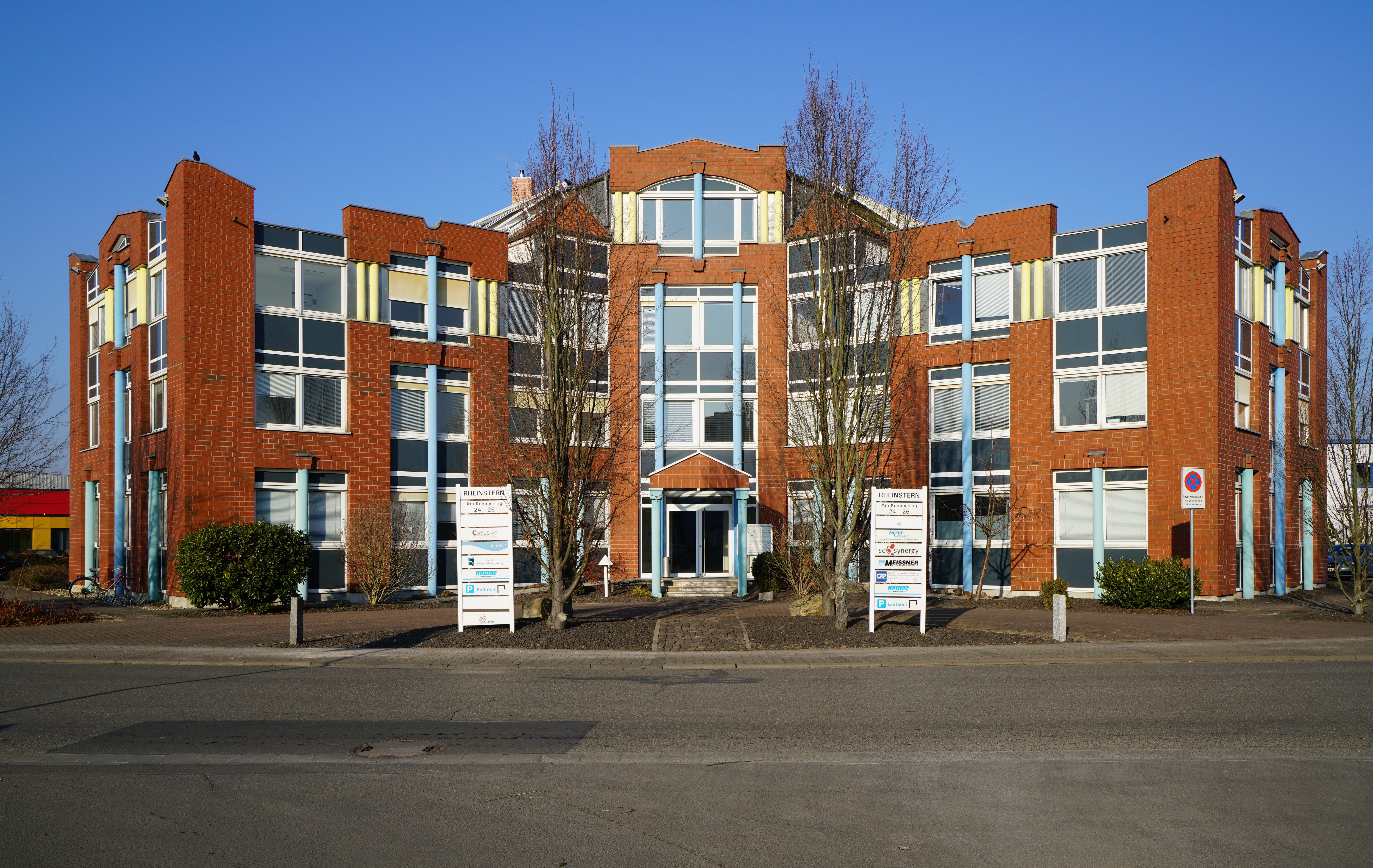 Fassade des Hauses Am Kümmerling 24–26 in Bodenheim in Rheinland-Pfalz: Sitz der Deutschen Umschlaggesellschaft Schiene-Straße (DUSS)